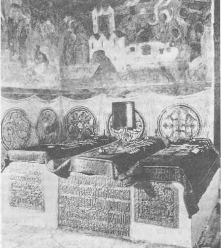 «Усыпальница Ивана Грозного. Интерьер. Надгробия усыпальницы не закрыты поздними футлярами; на них лежат подлинные покровы XVII в.»